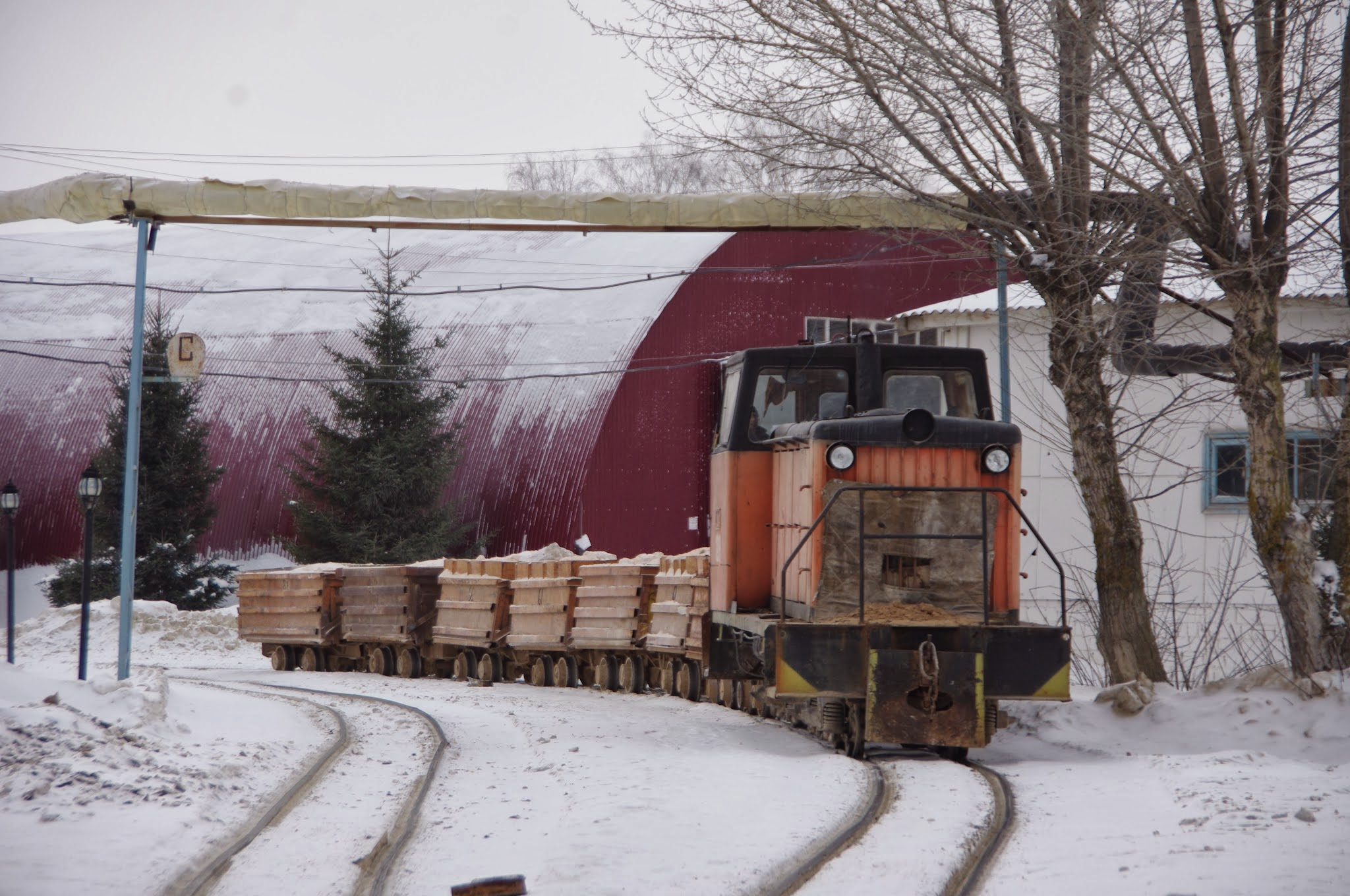 Bebyaevo, Nizhegorodskaya oblast', Russia